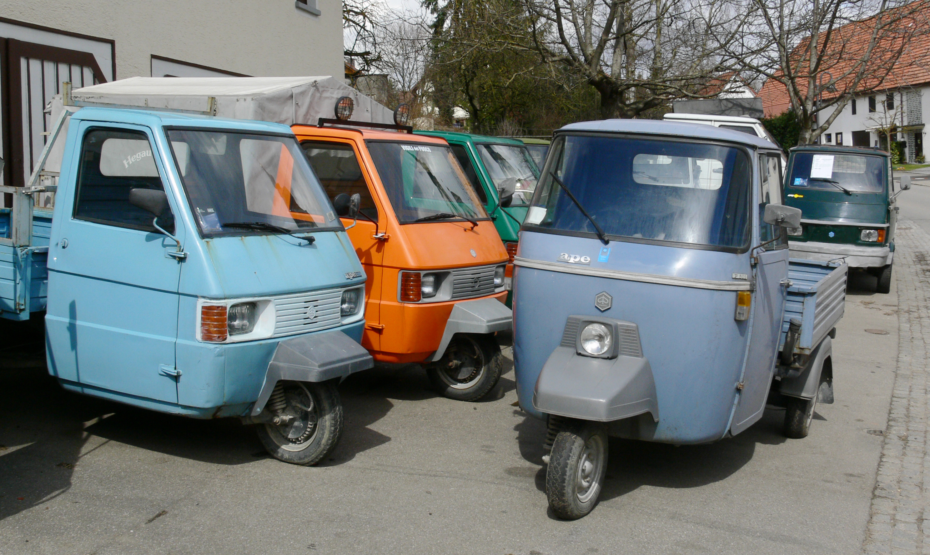 Otterswang, Gemeinde Bad Schussenried: Geschäft mit Piaggio-Ape-Kleintransportern